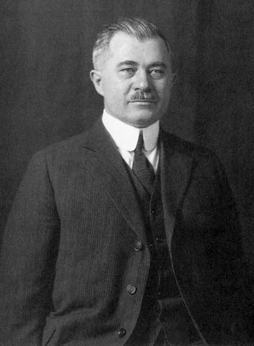 Galamb József (Joseph A. Galamb) (1881 – 1955) konstruktőr, a Ford Motor Company tervezője, a Ford T-modell egyik megalkotója.